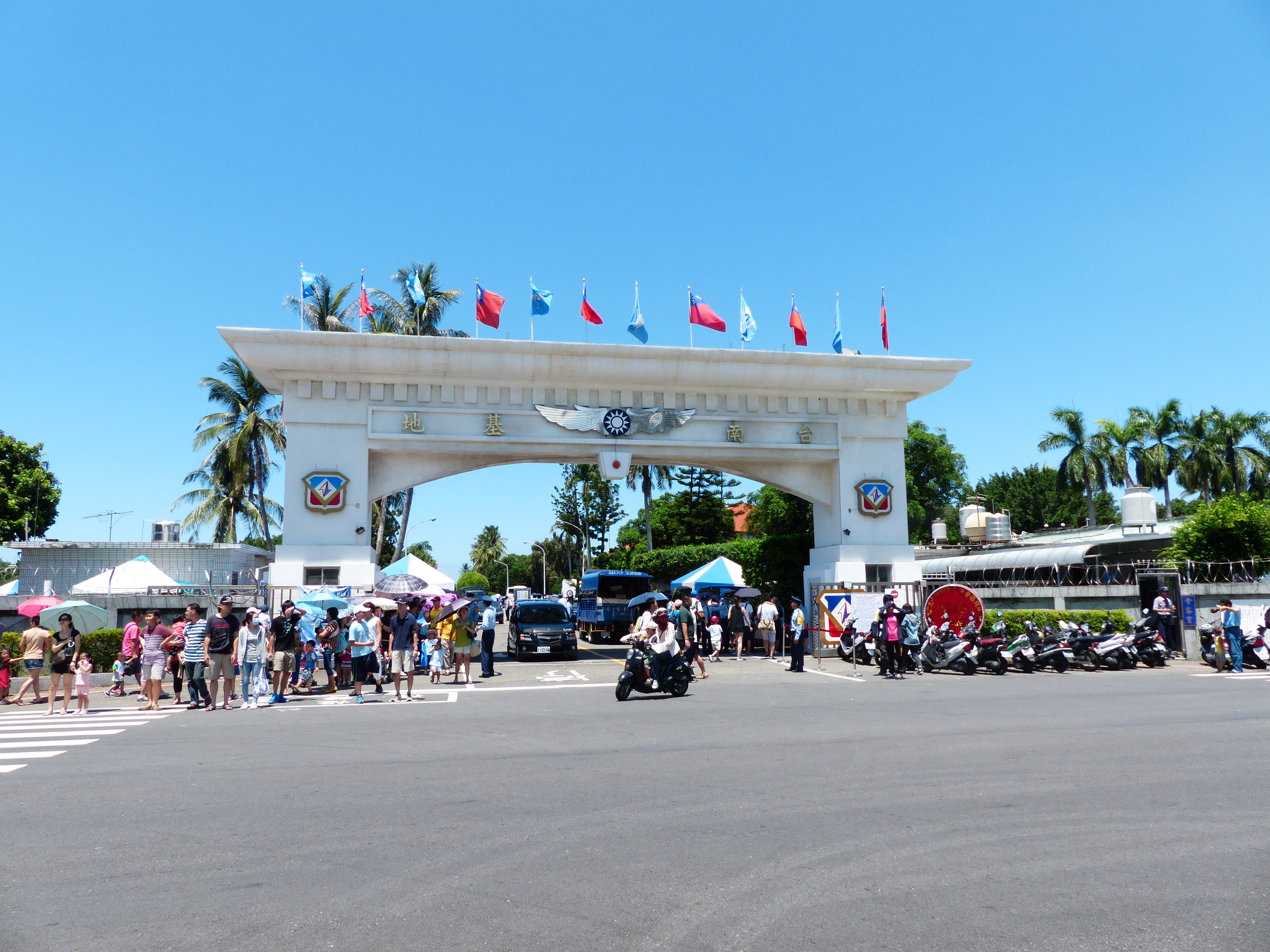 中文（新加坡）: 臺南空軍基地正門，攝於2013年營區開放活動。